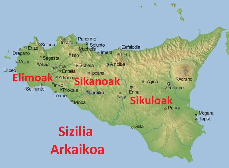 Sizilia arkaikoa